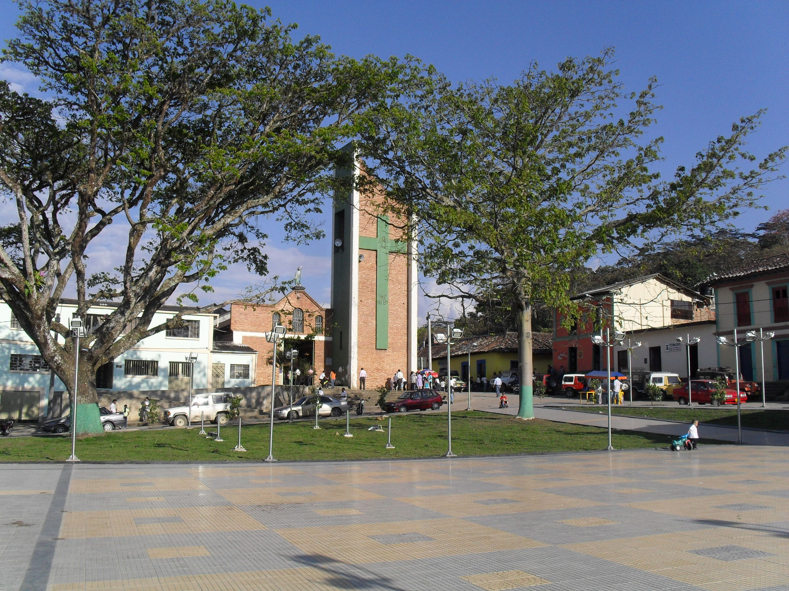 Parque principal de San José de Pare, Boyacá, Colombia